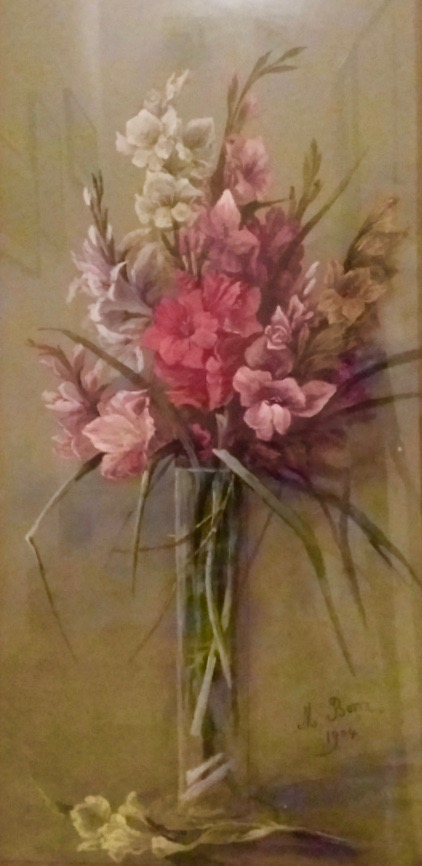 1904 Stilleben aus der Zeit ihrer Freundschaft mit Anna Peters